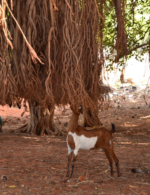 திசையன்விளைக்கருகே தேரிக்காட்டில் ஆடு ஒன்று